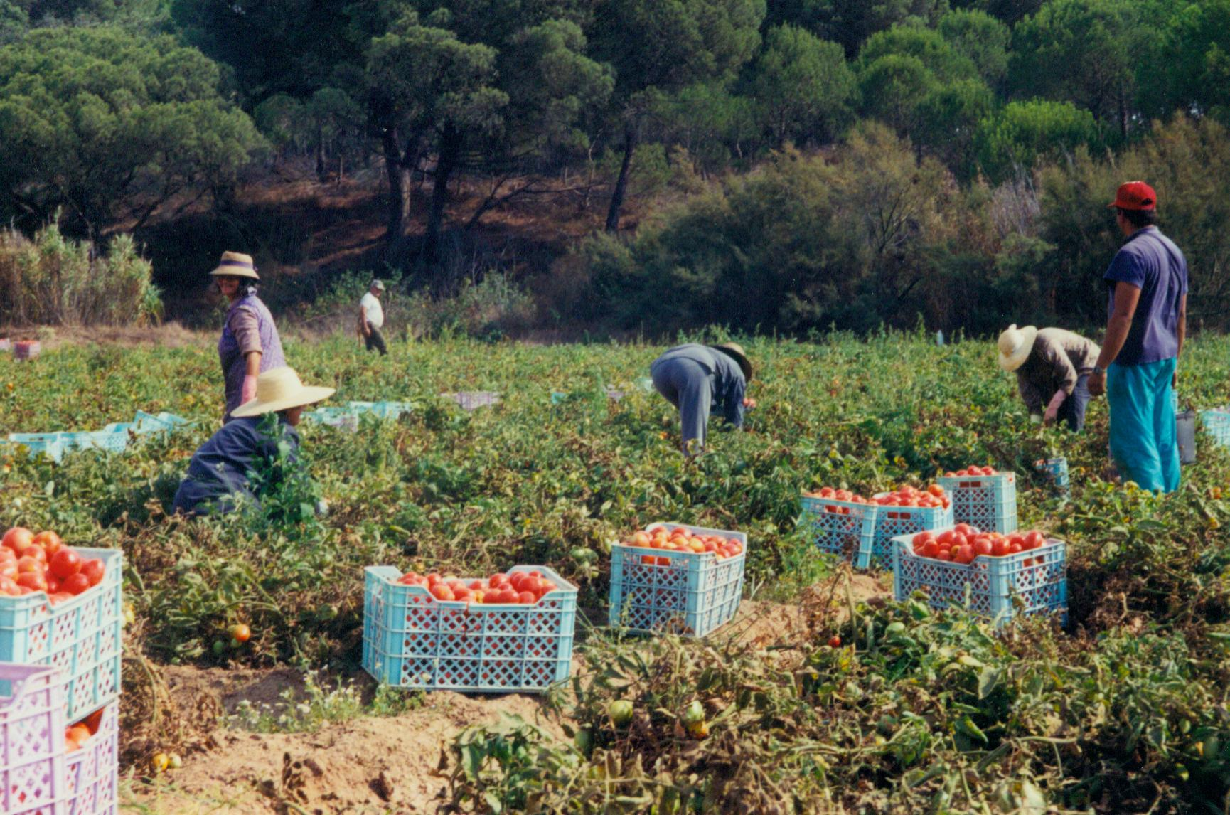 Melides, Tomatenernte